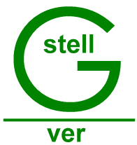 Droedel (eigen werk)